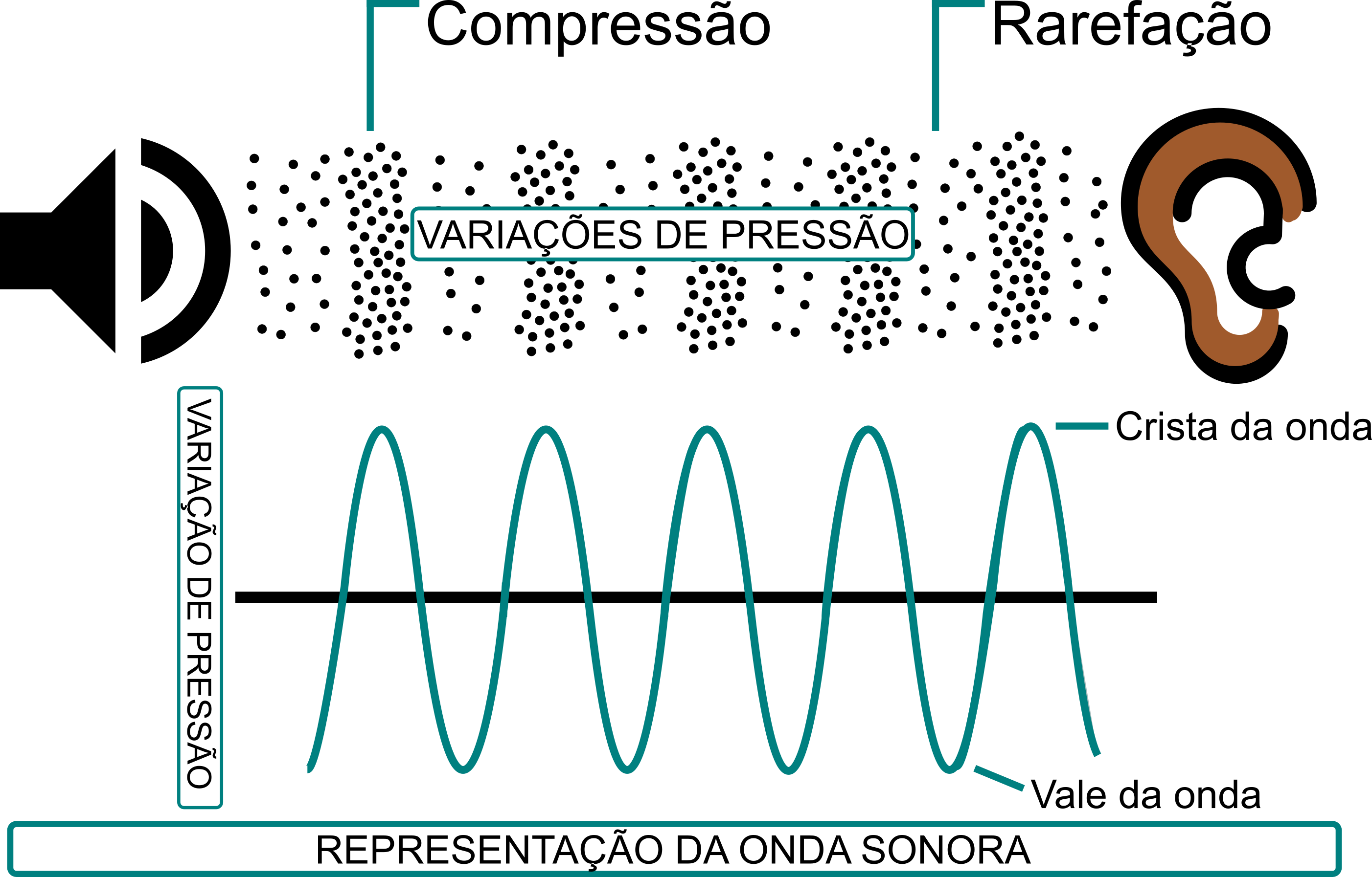 Onda sonora se propagando